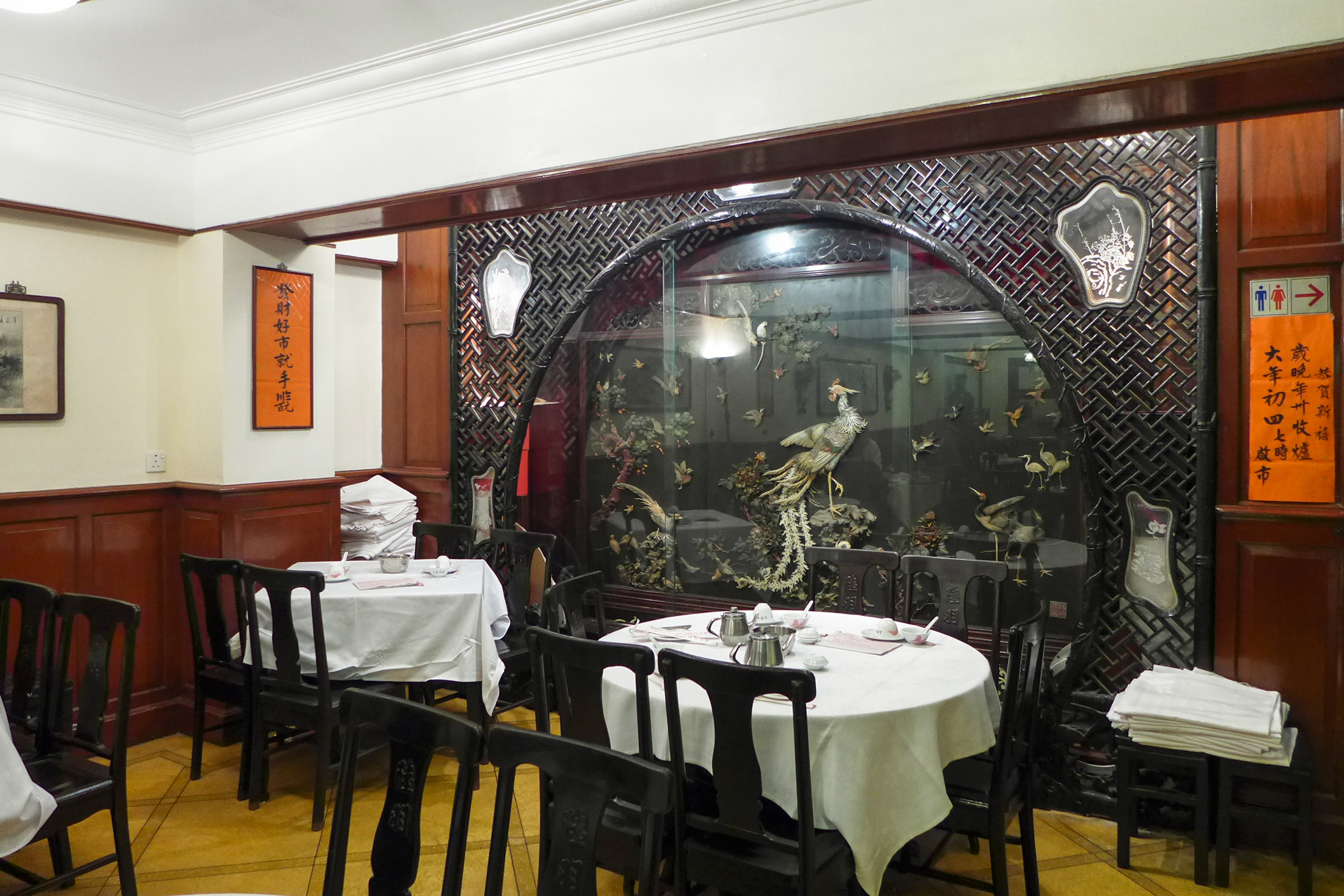 Luk Yu Tea House Level 2